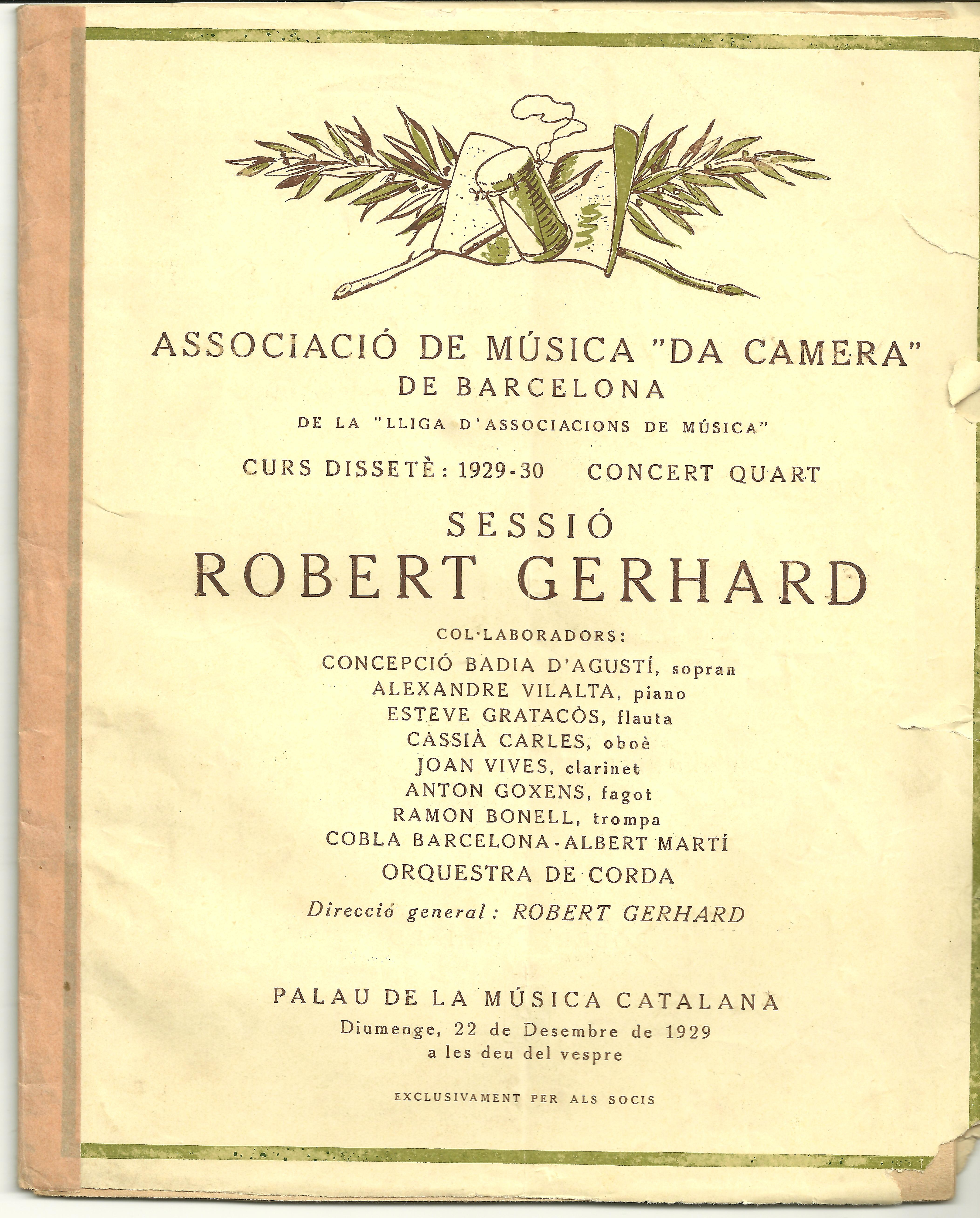 Estrena de Dos apunts, dirigit per Robert Gerhard a l'associació de música "da camera", Barcelona, 1929